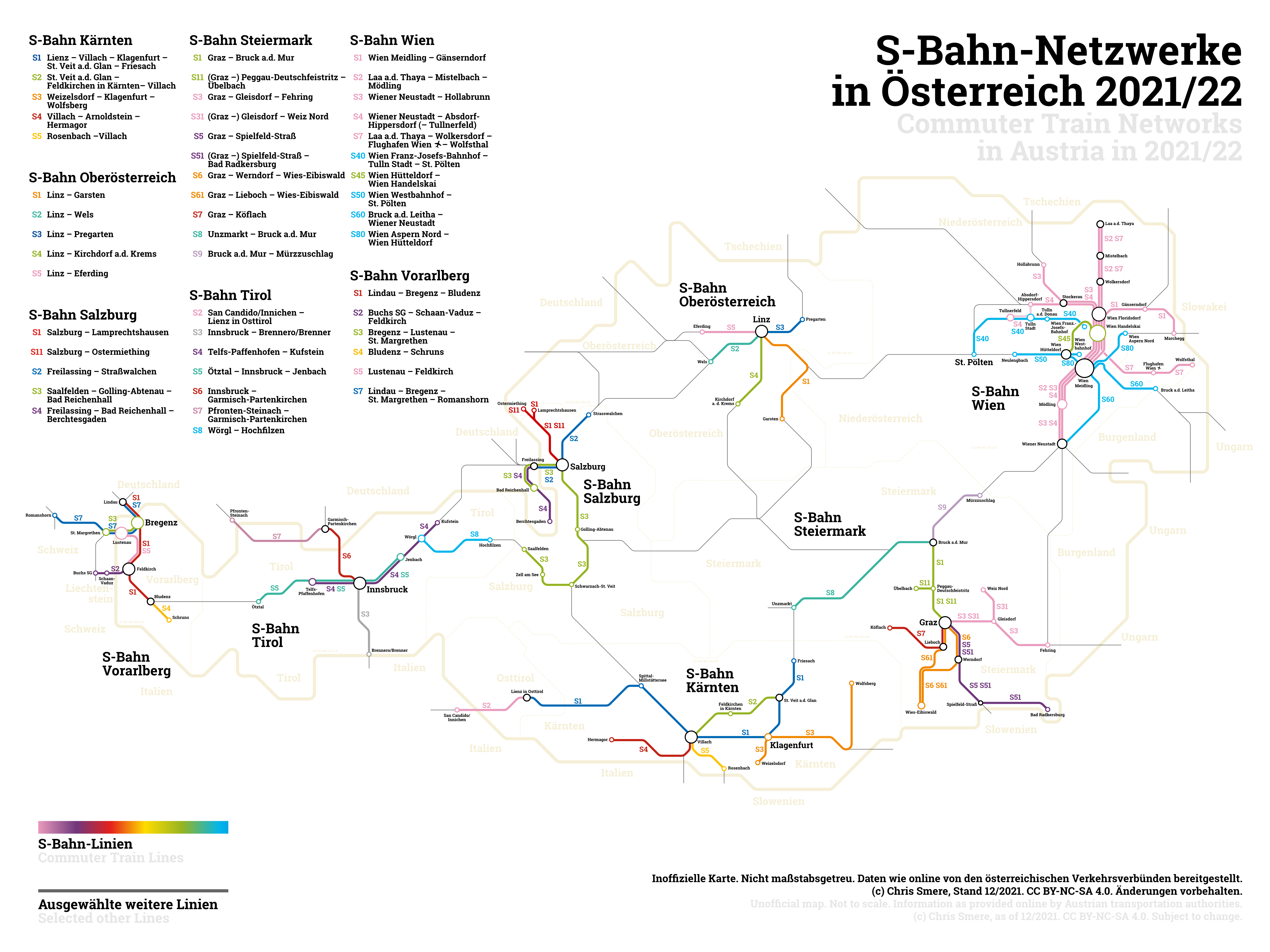 S-Bahn Netzwerke in Österreich